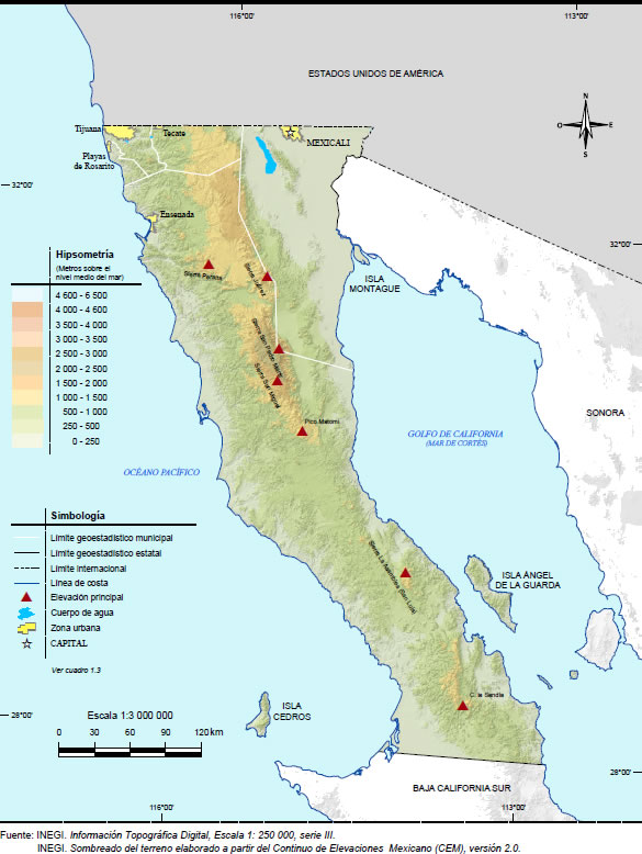 Representación del relieve de B.C. México